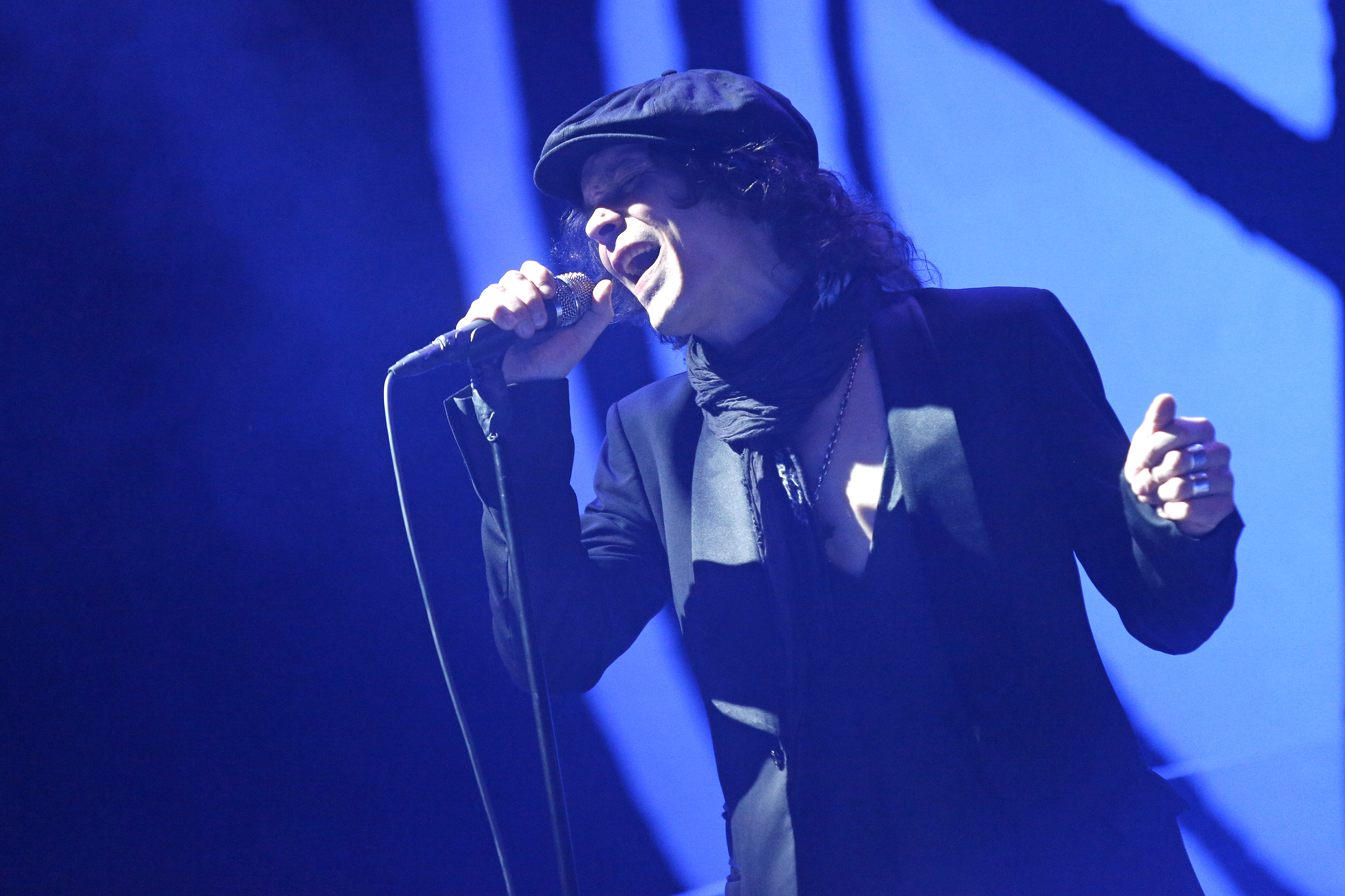 Ville Valo, Sänger und Gitarrist der Band HIM, steht beim Nova Rock-Festival 2013 auf der "Blue Stage"